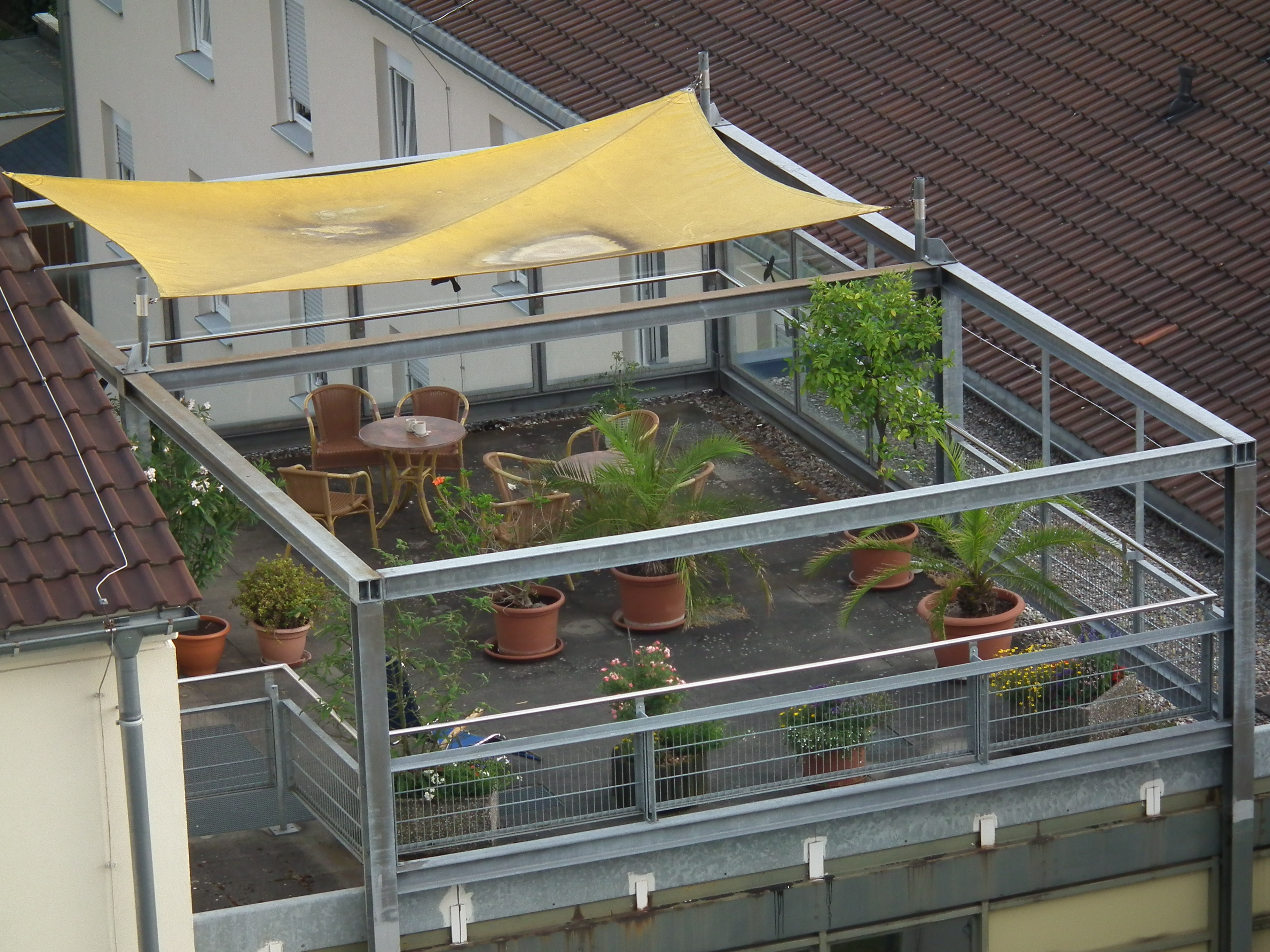 Dachgarten, fotografiert in Heidelberg (Baden-Württemberg, Deutschland)